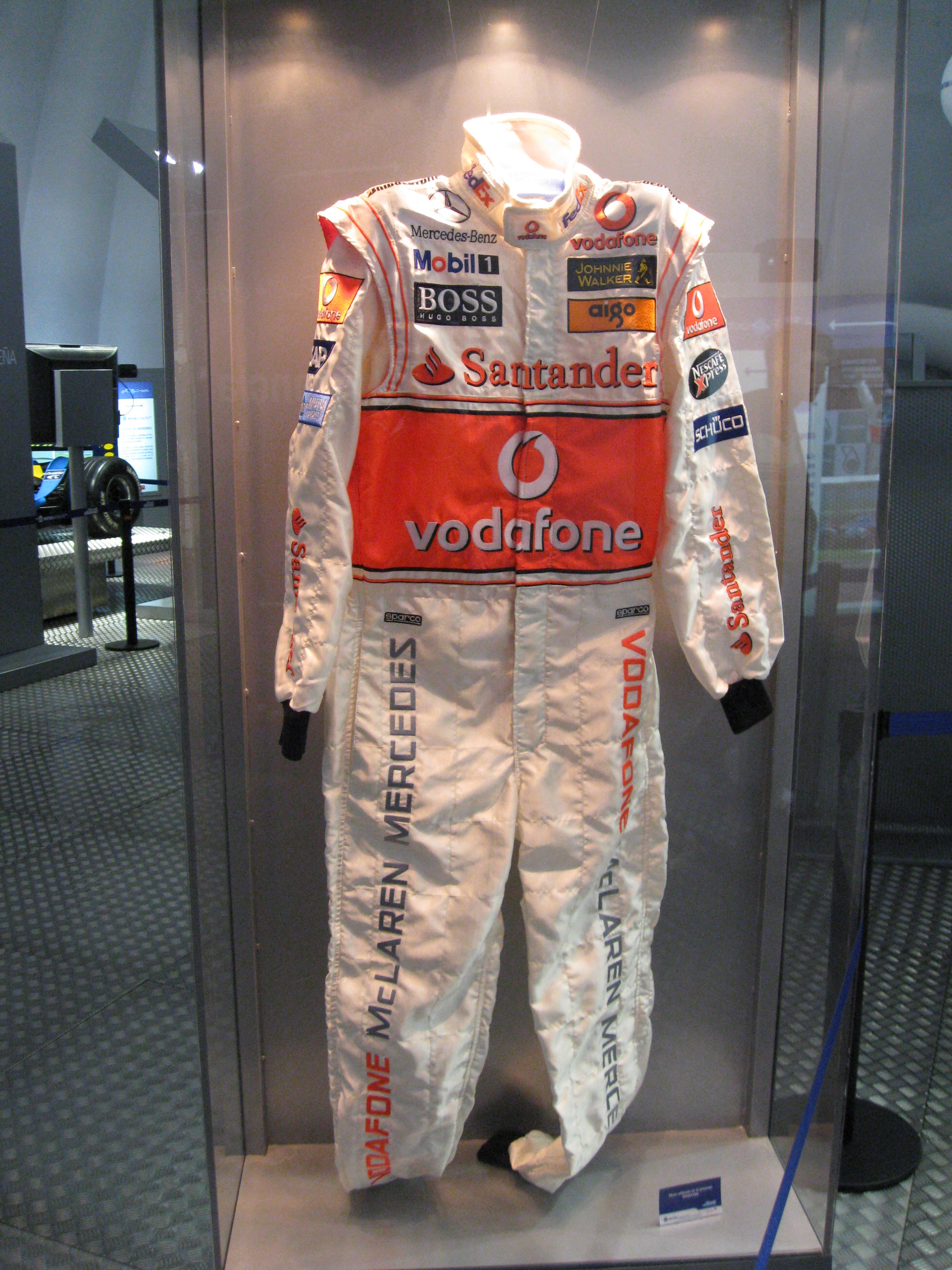 Mono de Fernando Alonso temporada en McLaren 2007Mono Fernando Alonso